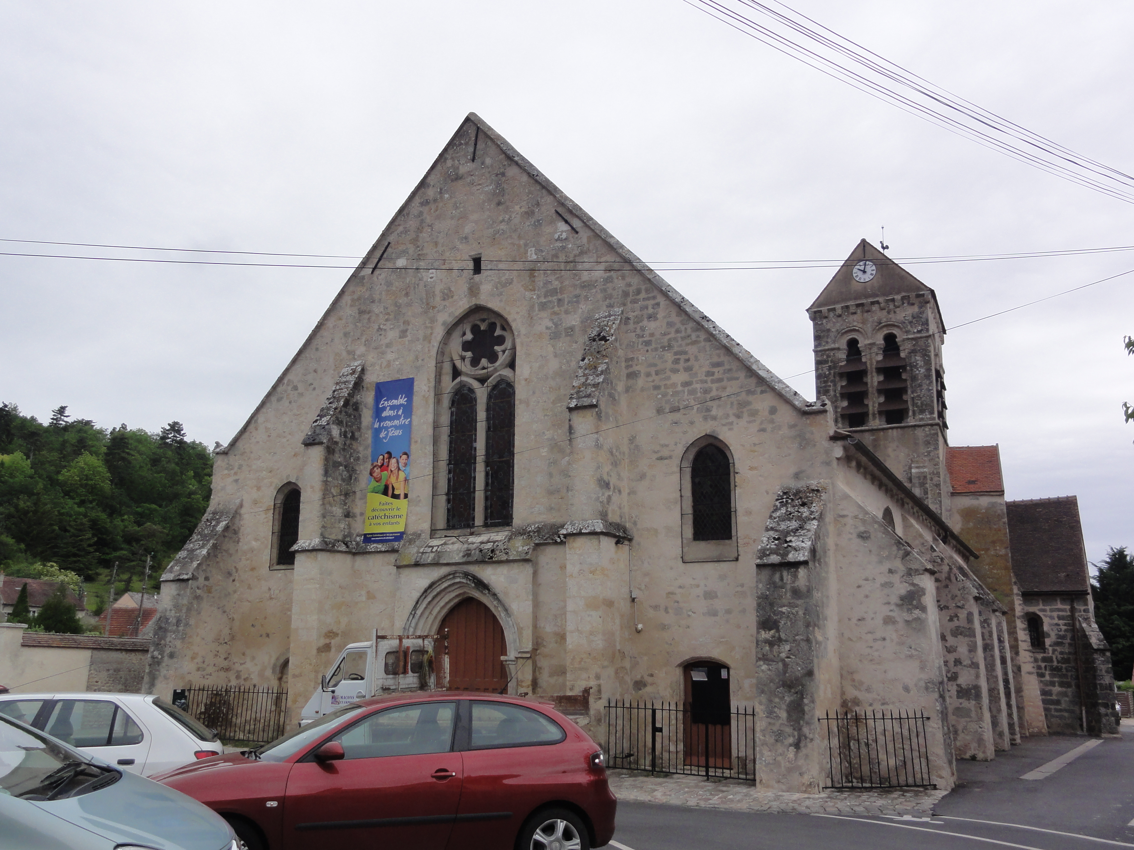 Saclas (Essonne) Église.